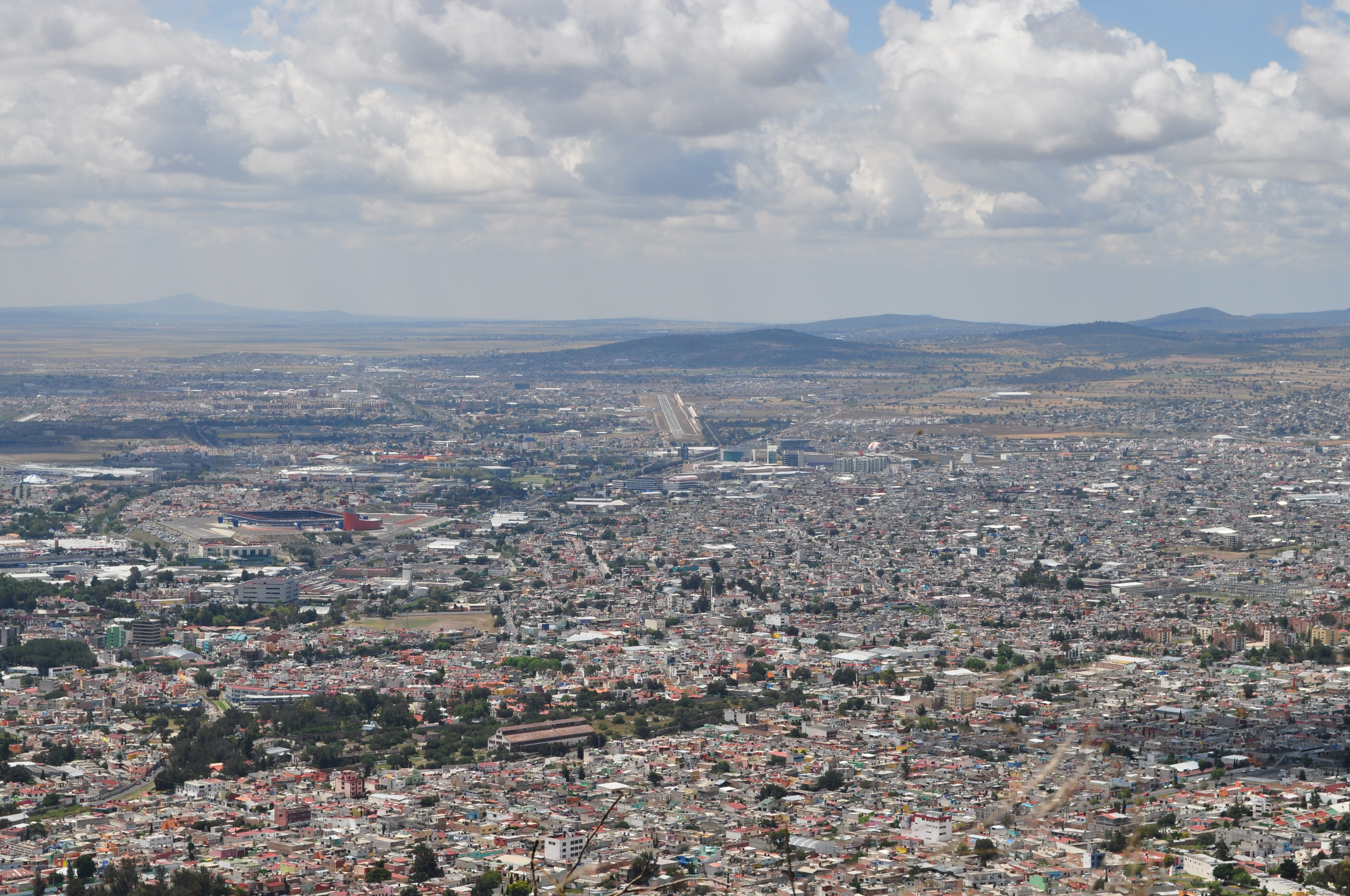 Pachuca, Hgo., Mexico